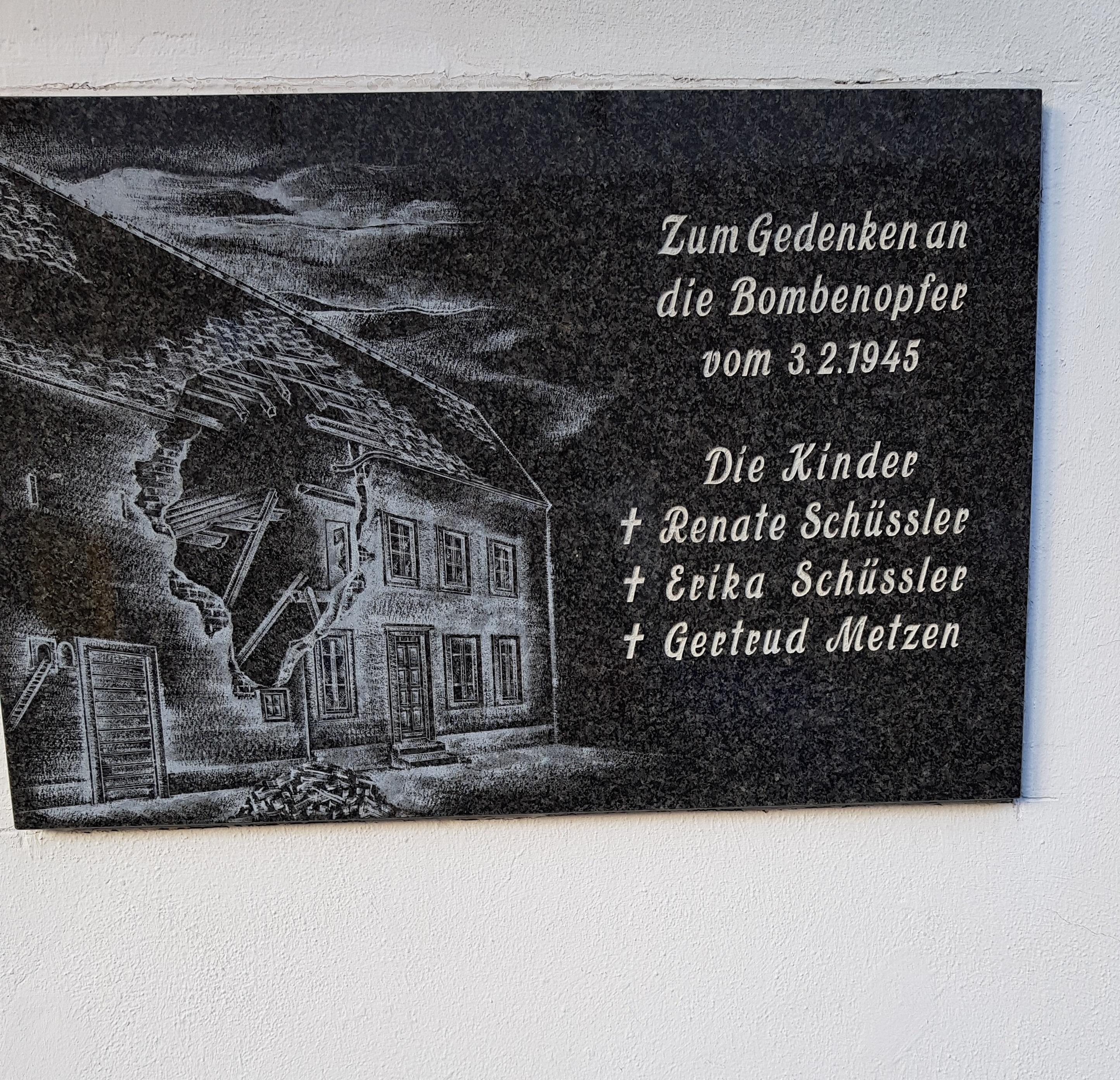 Die Gedenktafel für die drei Kinder, die der Fliegerbombe vom 3. Februar 1945 zum Opfer fielen. an der Wand der Bäckerei in der Straße "Am Kapelleneck"